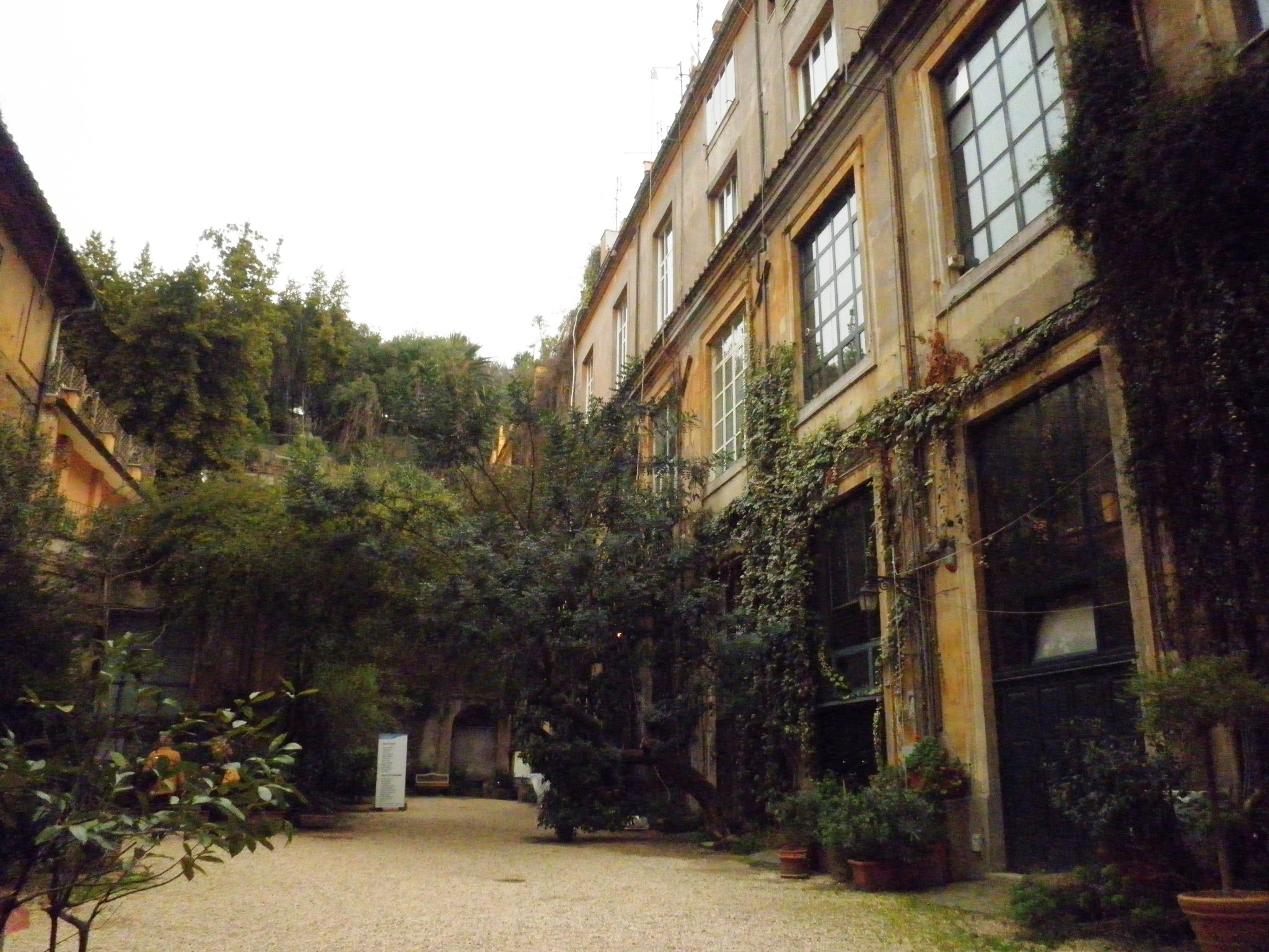 Roma, via Margutta, il cortile degli "Studi di pittura e scultura"